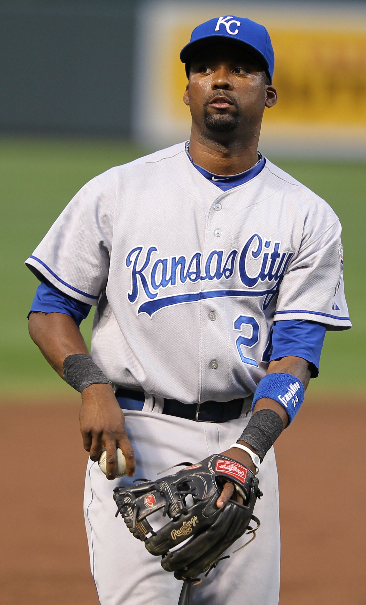 Wilson Betemit